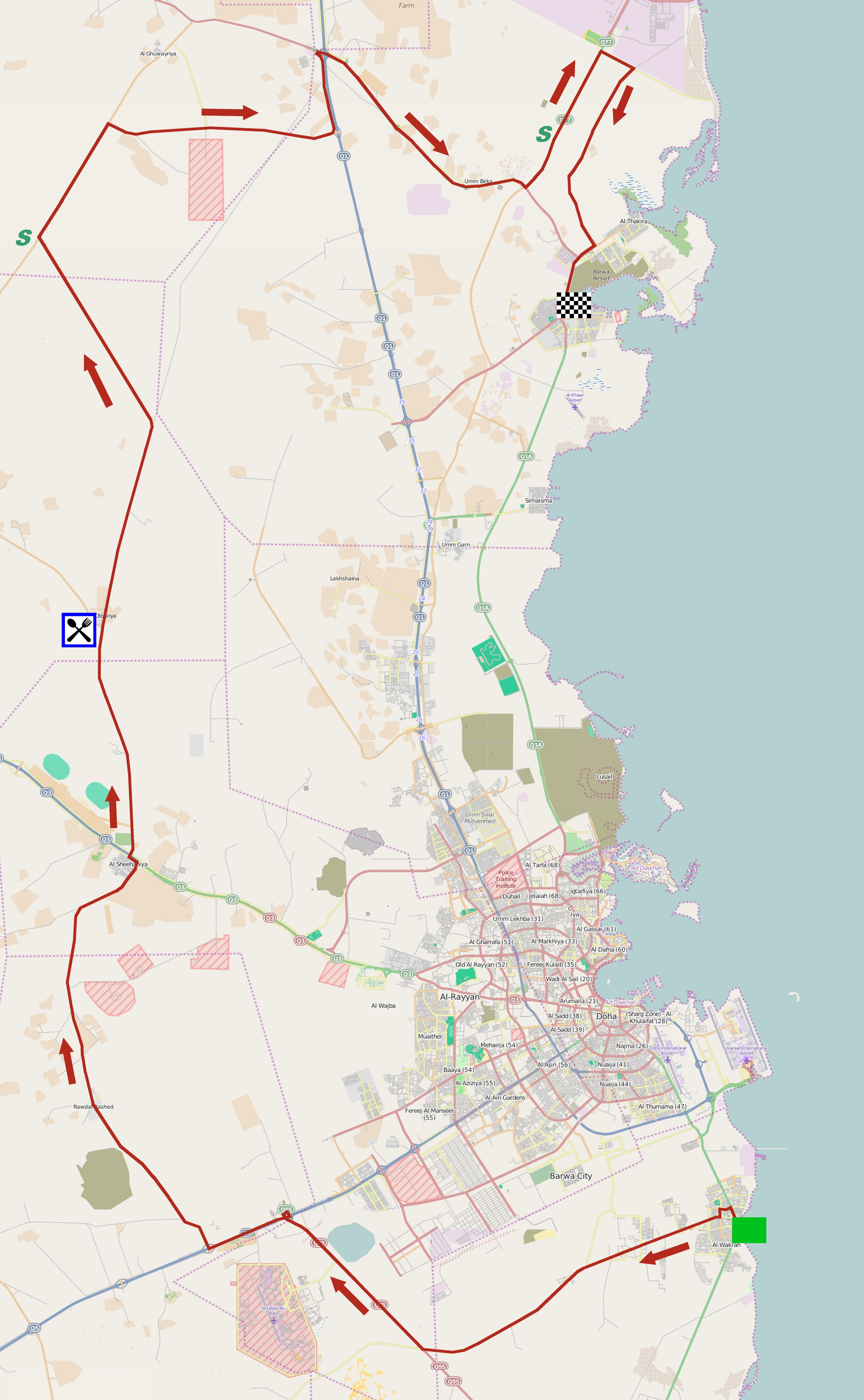 Parcours de la deuxième étape du Tour du Qatar 2015. This map may be incomplete, and may contain errors. Don't rely solely on it for navigation.